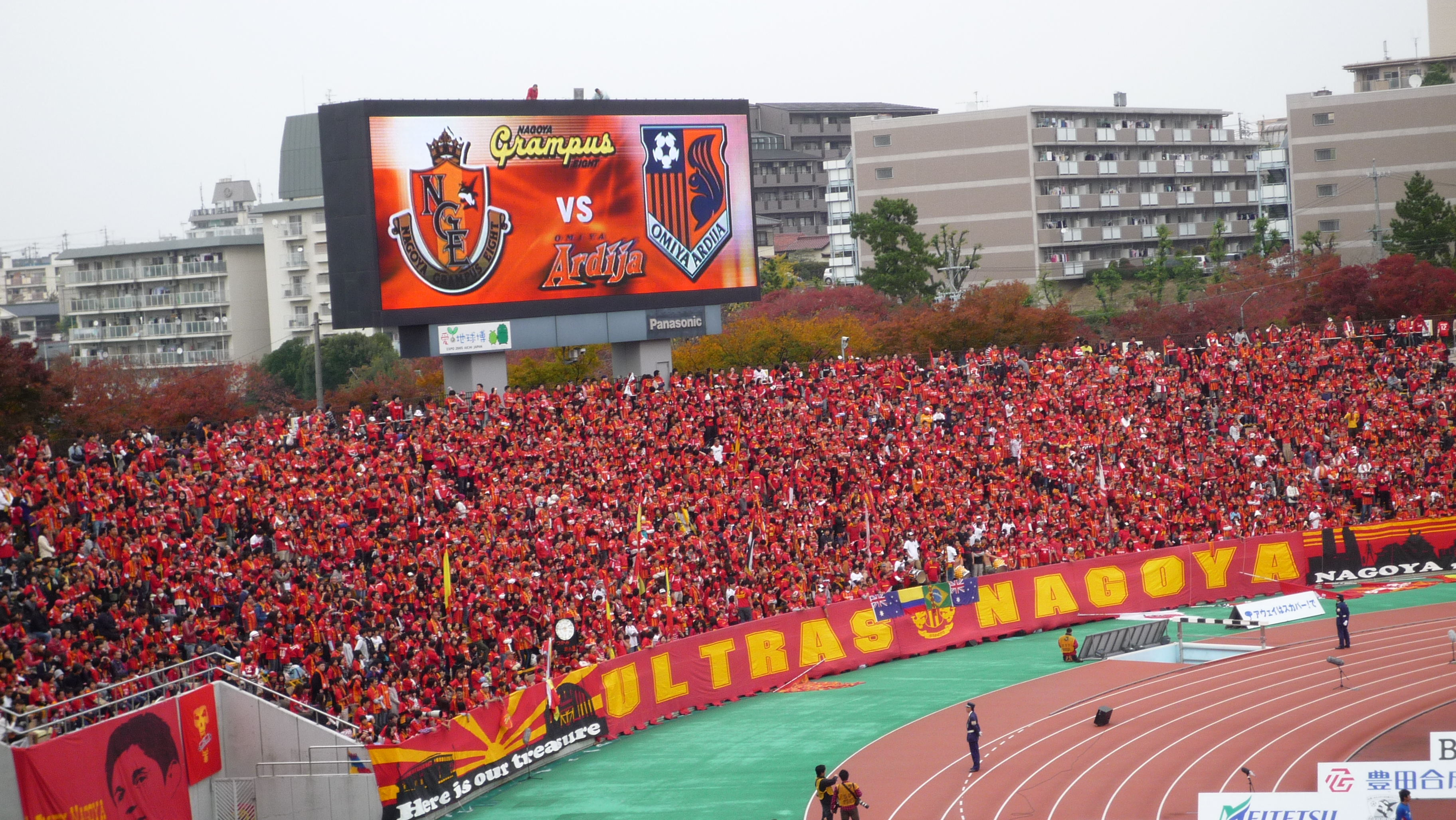 瑞穂陸上競技場1